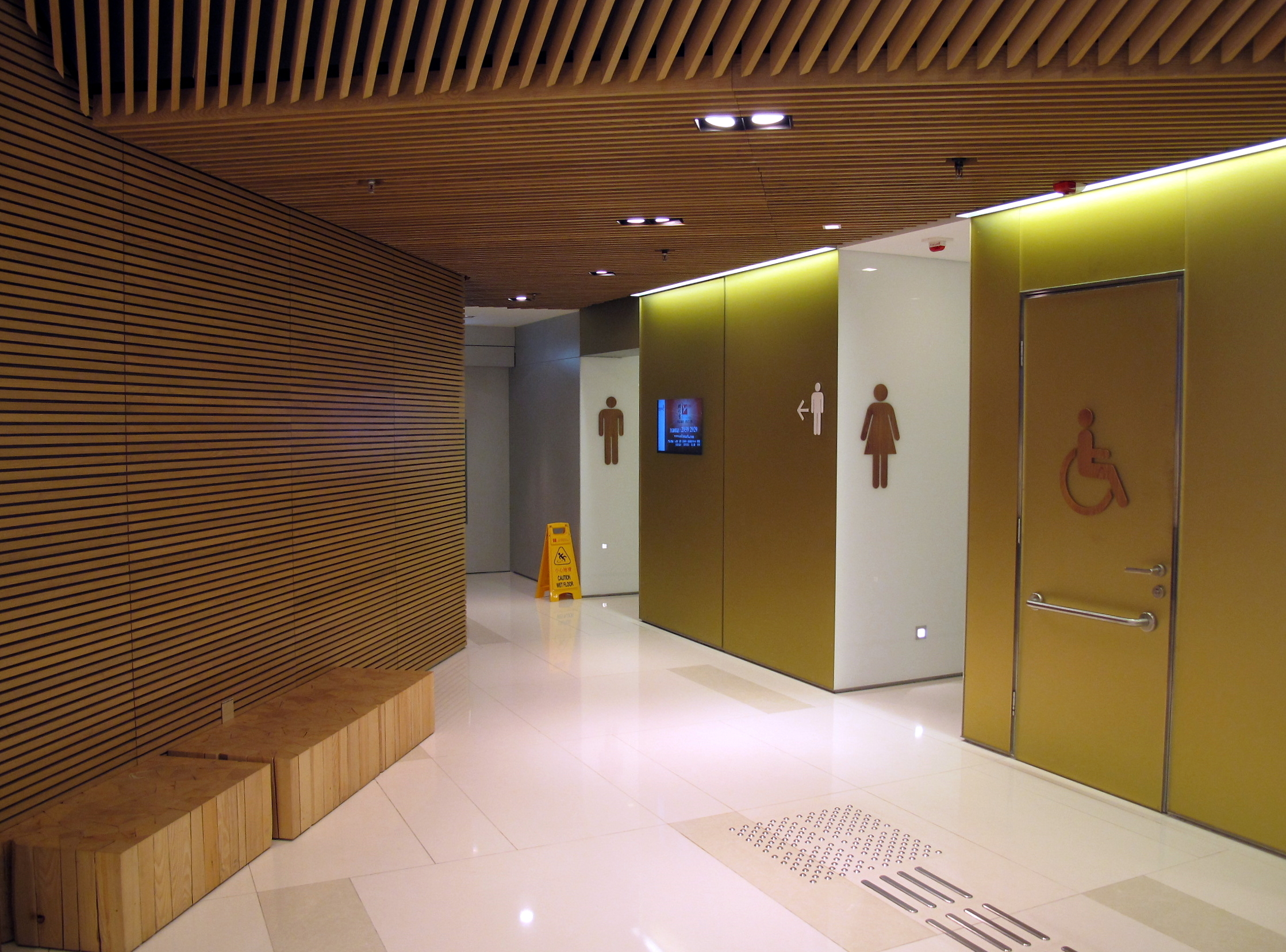 Mikiki Restroom Entrance